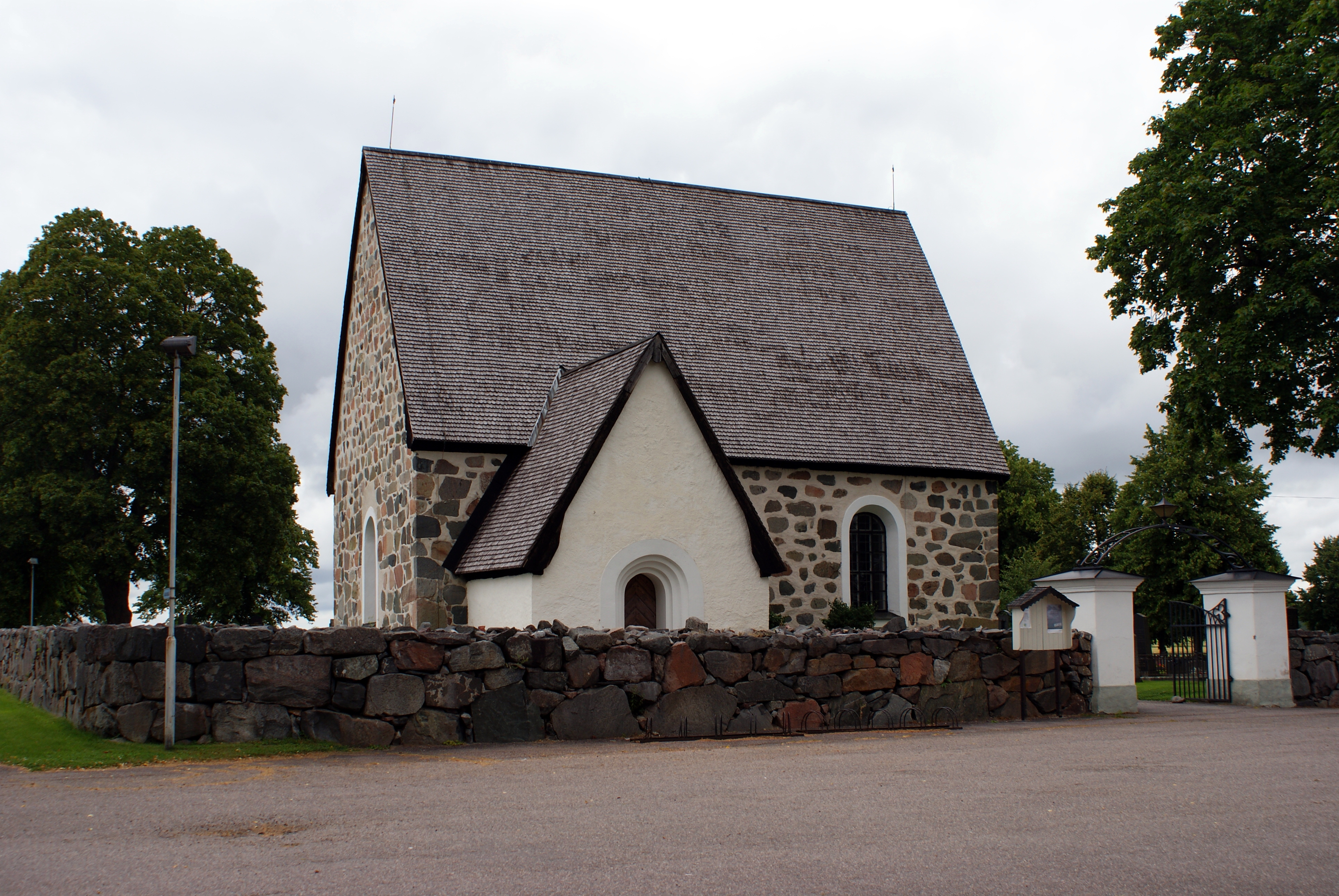 Skäfthammars kyrka i Gimo